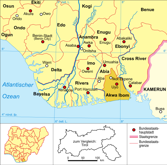 Politische Karte Nigerias (Bundesstaat Akwa Ibom hervorgehoben)